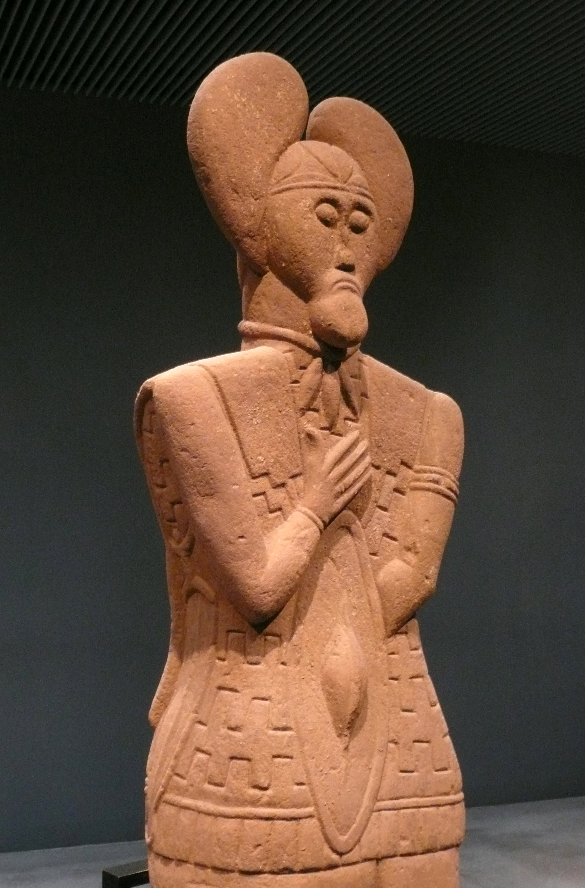 Lebensgroße Sandsteinstatue des 'Keltenfürst vom Glauberg' aus Grab 1 am Glauberg in Hessen, ca. 500 v. Chr., Ansicht von vorne links (Detail). Ausstellungort: Museum Keltenwelt am Glauberg.